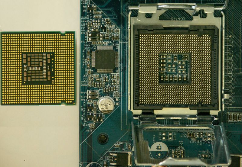 CPU and socket